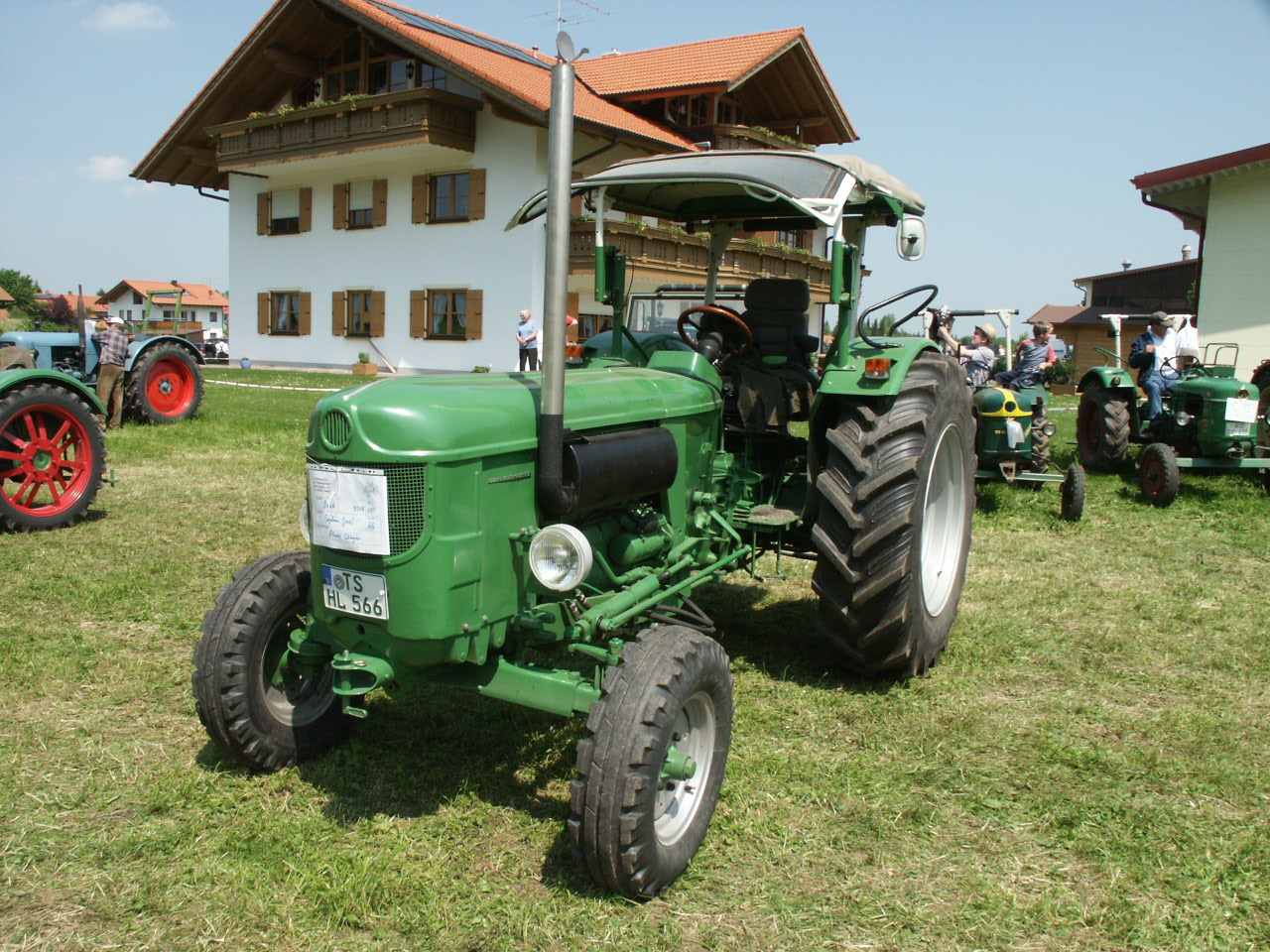 Deutz D 5505, Baujahr 1966